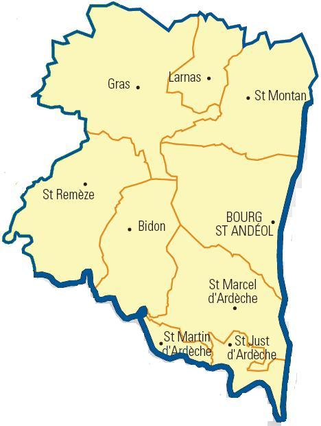 Carte détaillée des communes du canton (Ardèche)